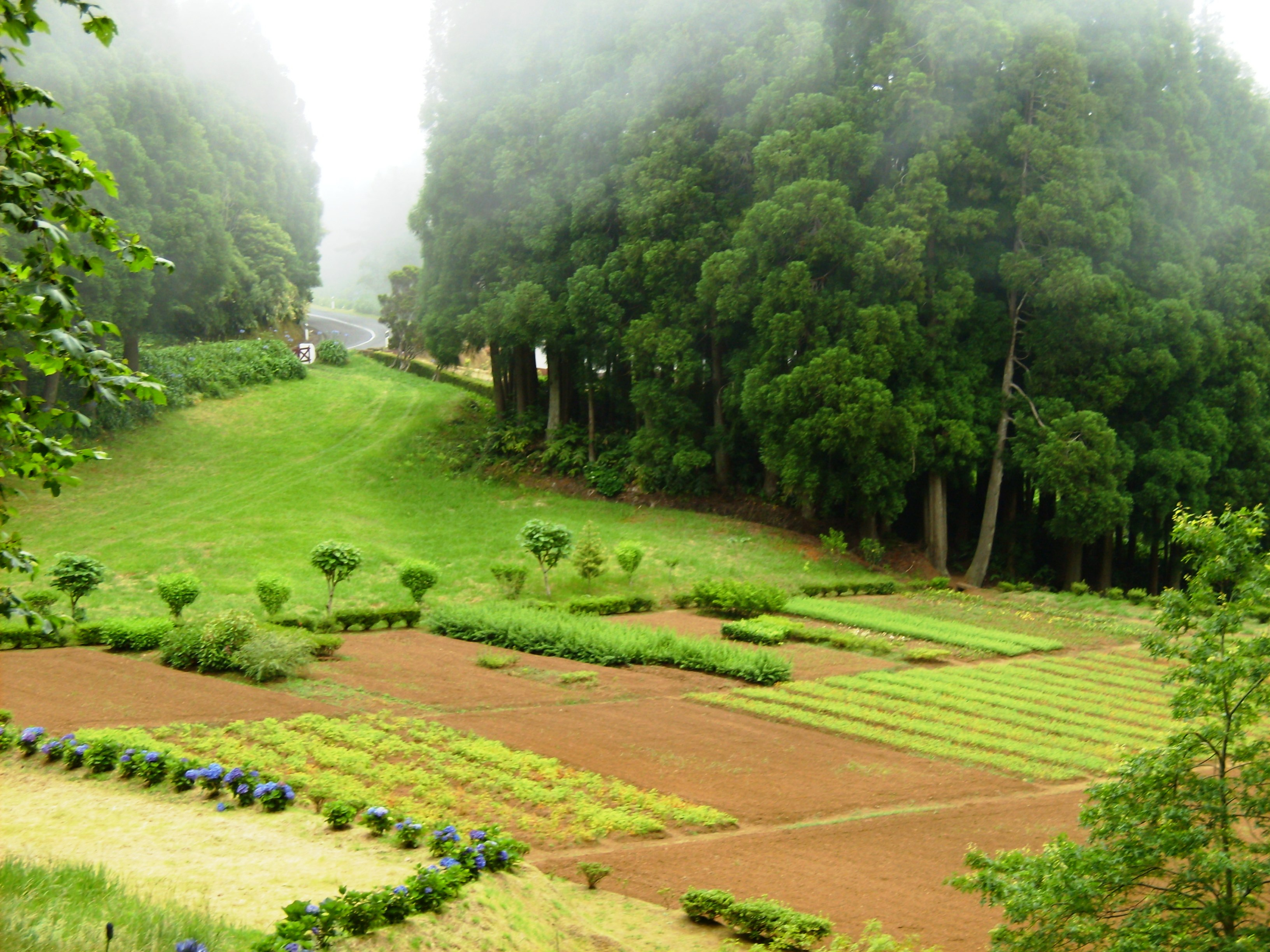 Reserva Florestal de Recreio das Fontinhas, freguesia do Santo Espírito, concelho da Vila do Porto, ilha de Santa Maria, Açores.